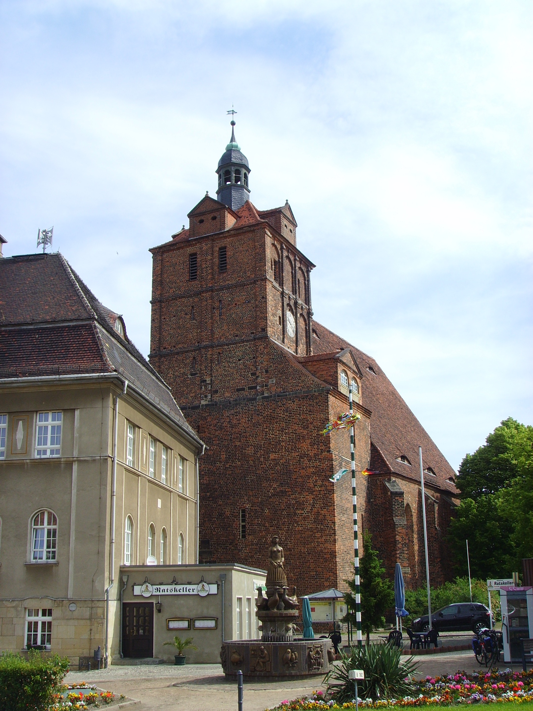 Kirche in Dommitzsch